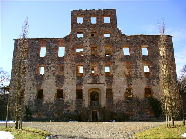 Foto: Tor Svensson